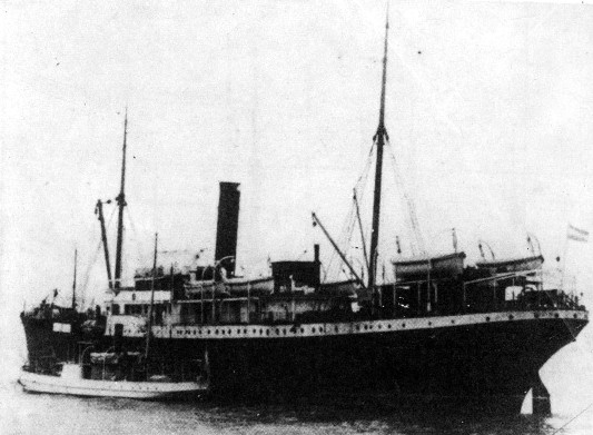 Barco argentino Presidente Mitre. Es capturado durante la Primera Guerra Mundial (28 de noviembre de 1915) fue interceptado por el crucero británico “Orama” en el Atlántico Sur a unas 12 millas del faro de Punta Médanos